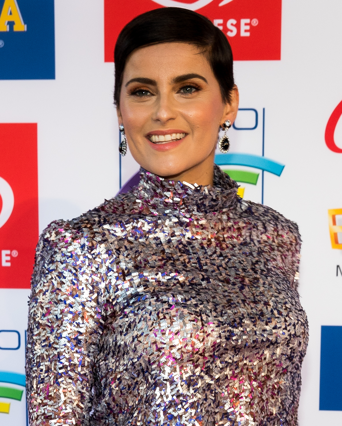 during Radio Regenbogen Award 2017 at Europapark, Rust, Baden-Württemberg, Germany on 2017-04-07, Photo: Sven Mandel